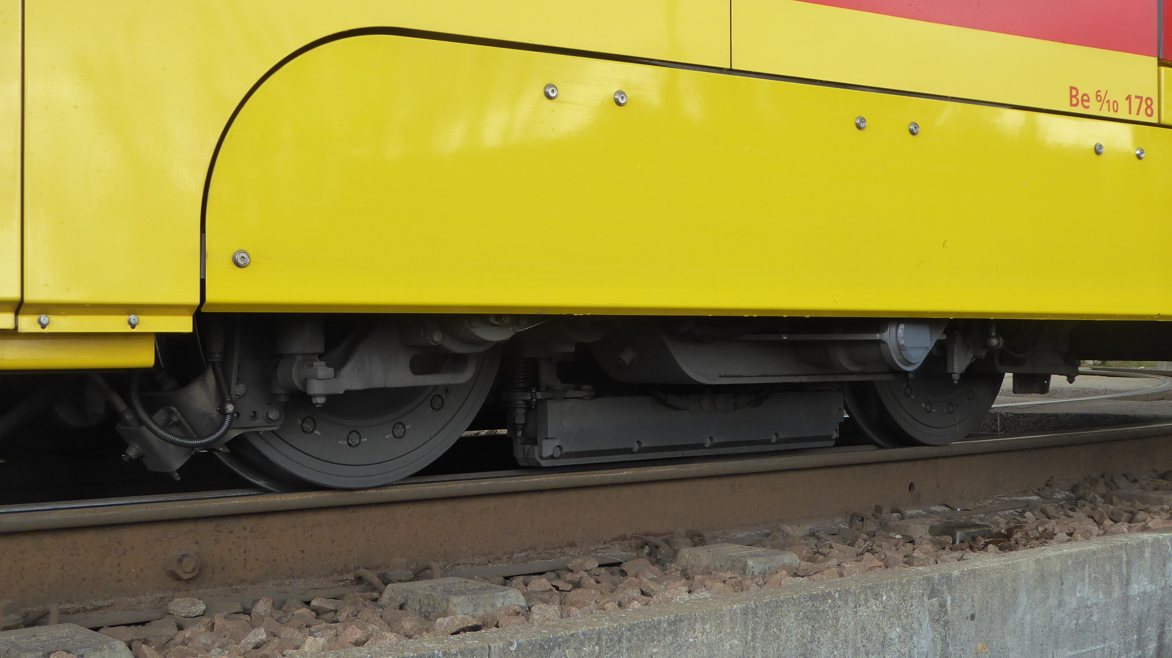 Triebdrehgestell des Tango-Trams Be 6/10 178 der Baselland Transport (BLT)Aufnahmeort: Station Rodersdorf